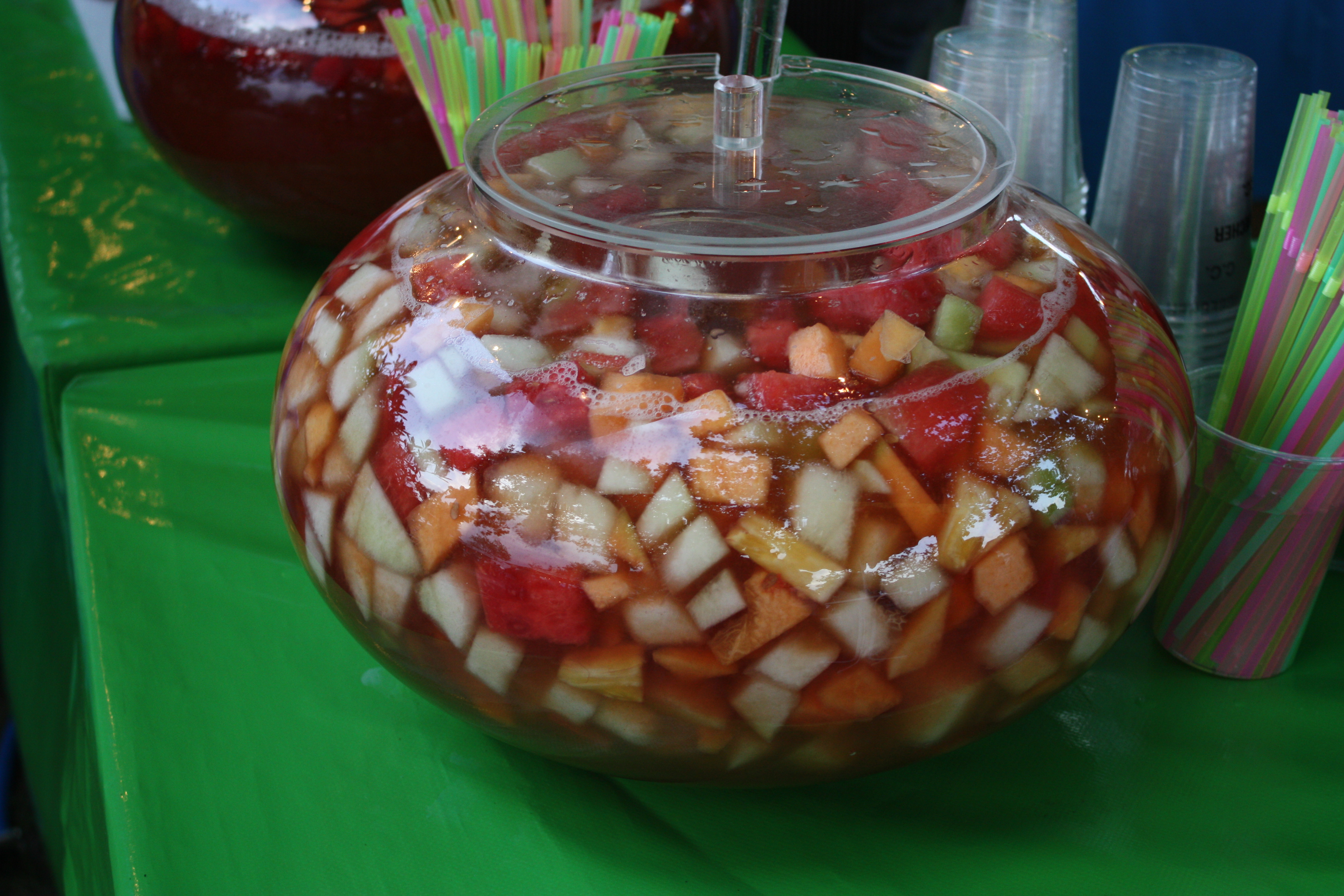 Früchtebowle, Steinhude